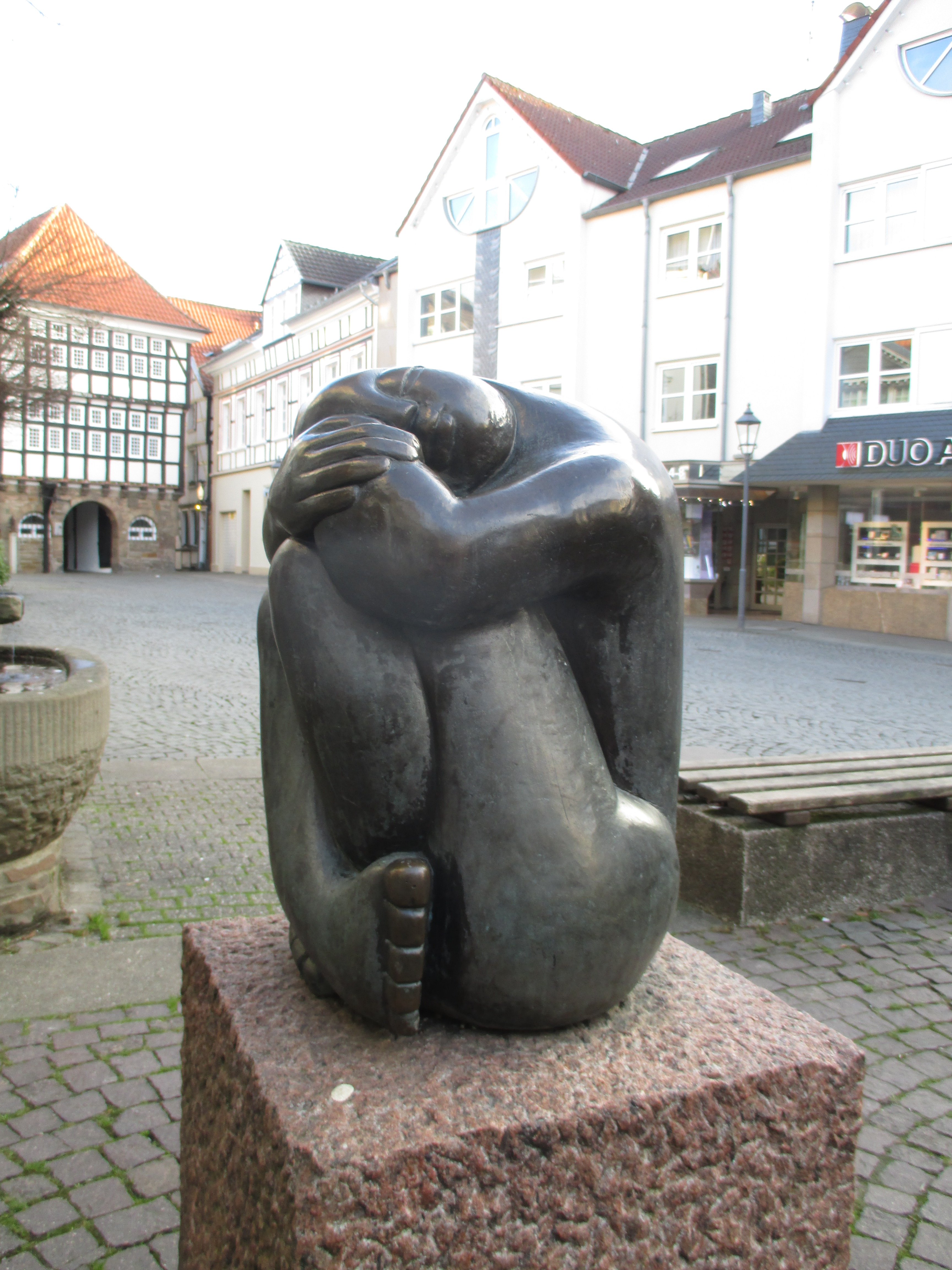 "Die Hockende" (1980) von Ulla H´loch-Wiedey.